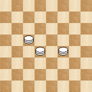 центральная крывая